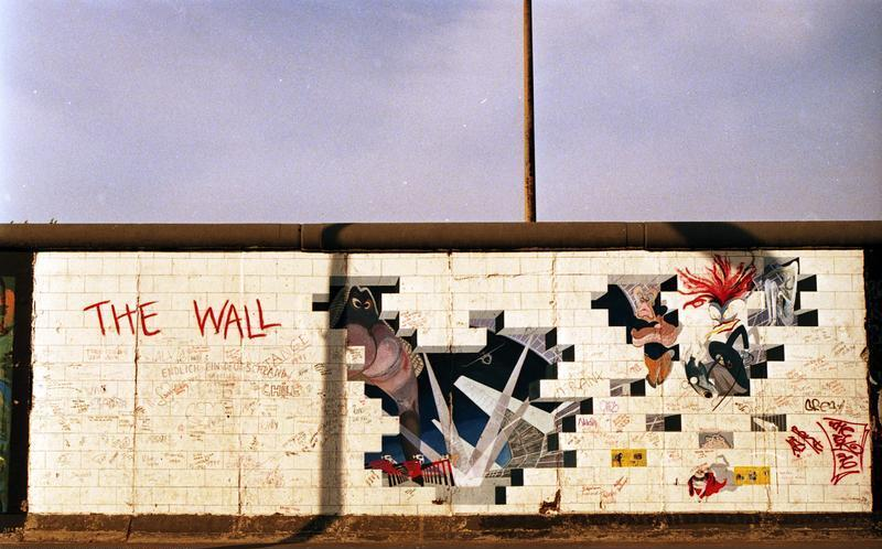 25.7.1991 "East-Side-Galery", gelegen zwischen der Jannowitzbrücke und der Oberbaumbrücke Reste der Berliner Mauer, die nach der Öffnung von vorwiegend ostdeutschen Künstlern auf der Ost-Seite bemalt wurden.